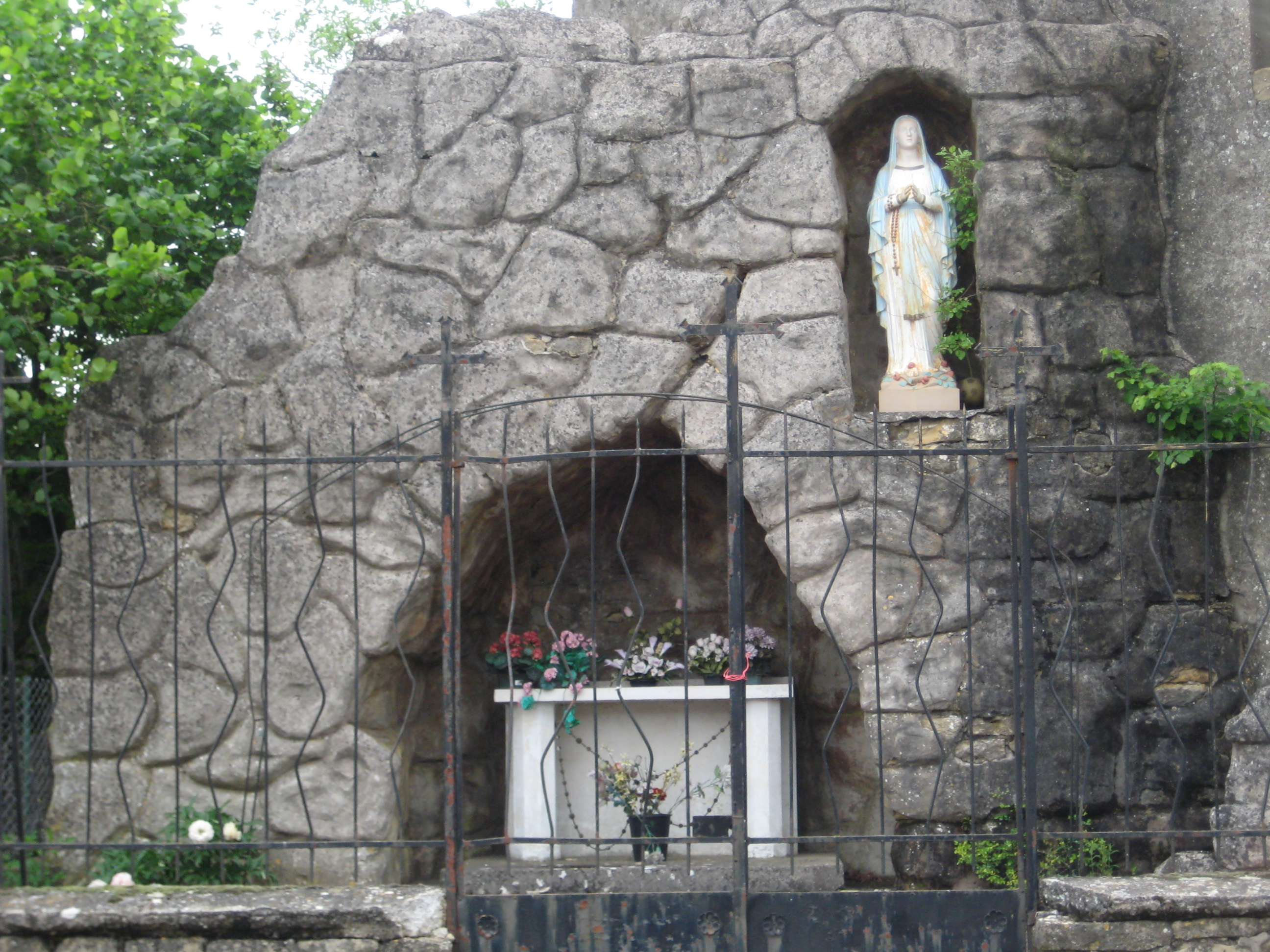 Description Grotte de Trieux Date16 May 2009Sourcemon appareil photoAuthorAimelaime Grotte de Trieux